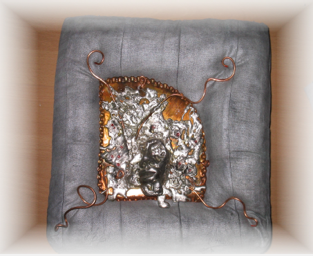 Pálnagy László egy alkotása